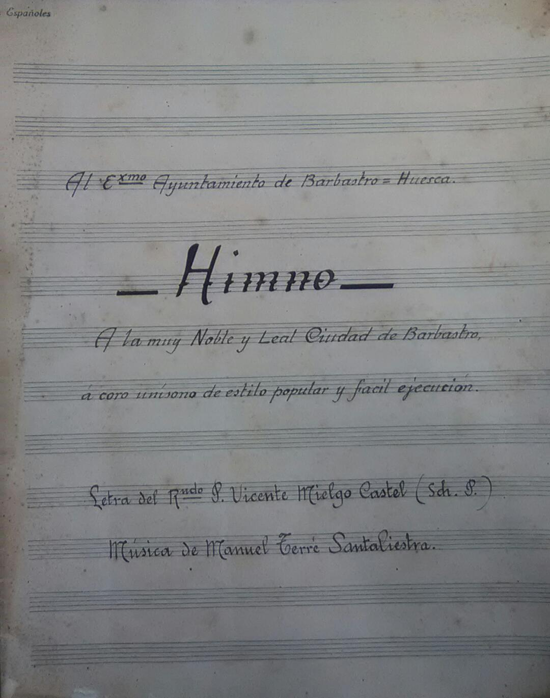 Partitura original